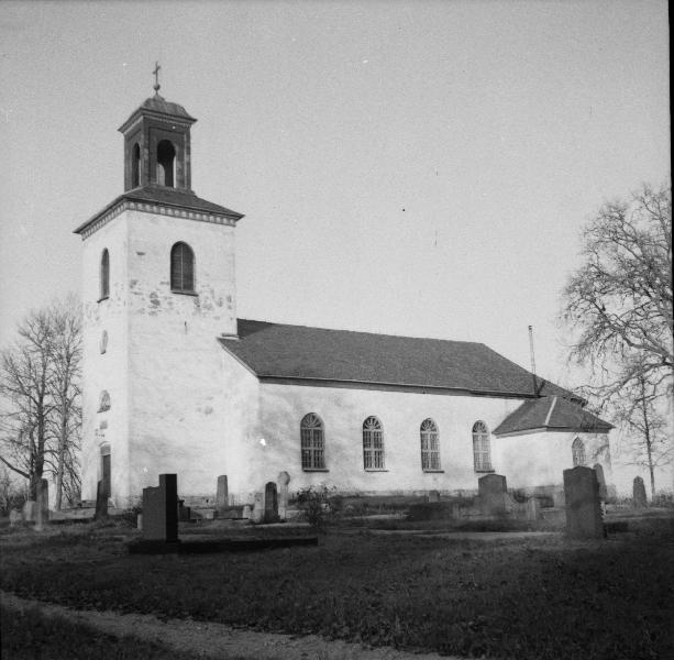 Nårunga kyrka